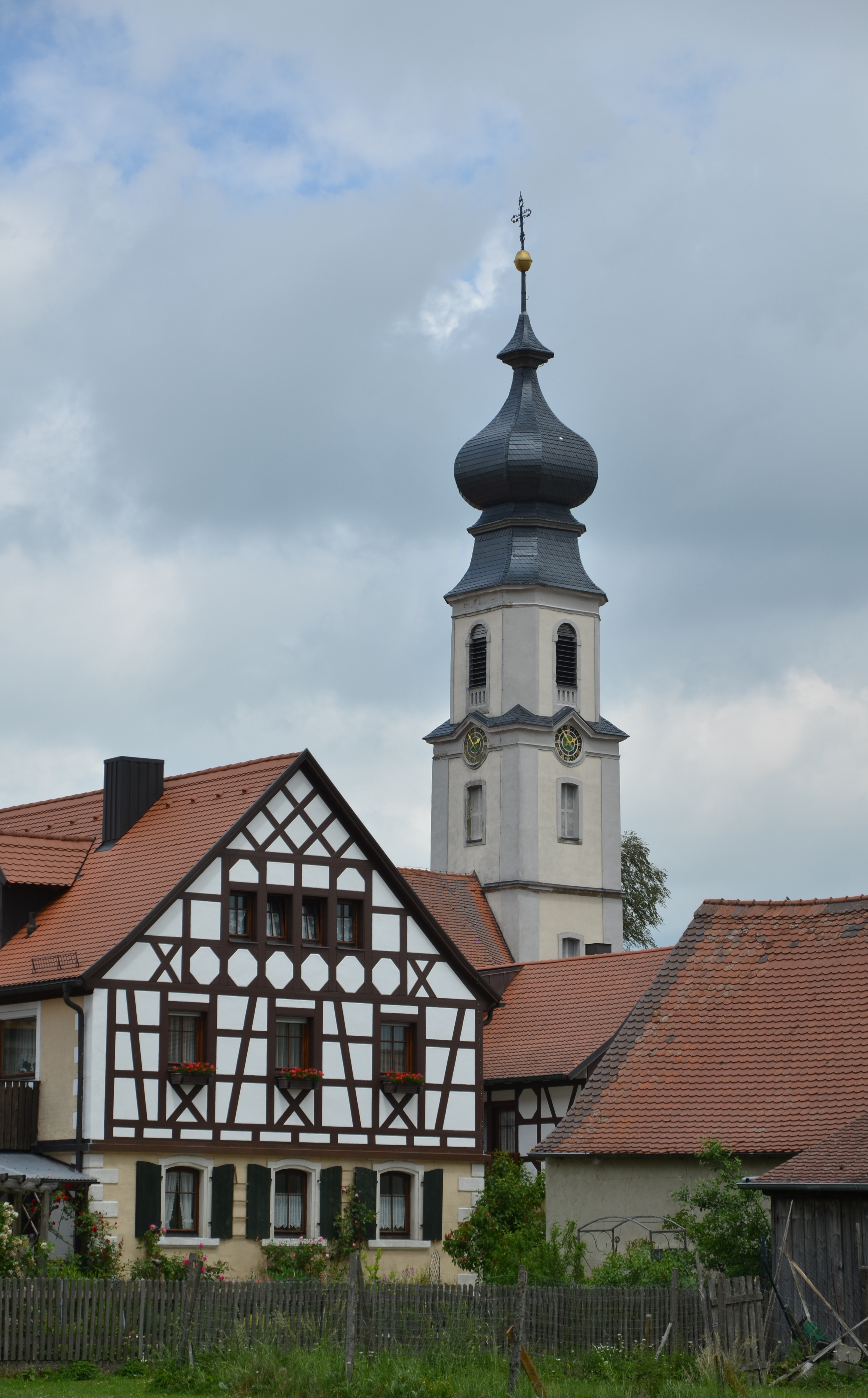 evang.-luth. Kirche St. Sebastian, Cornelius und Cyprian in Binzwangen